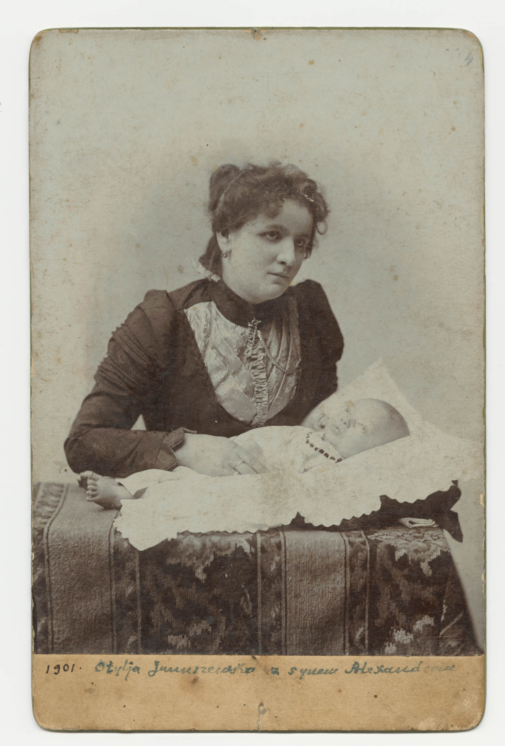 Fotografia post mortem przedstawiajaca kobietę w czarnej sukni z martwym dzieckiem, leżącym na białej powłoczce ułożonej na wzorzystym kocu. Brak informacji o zakładzie, w którym wykonano zdjęcie. Na awersie, pod fotografią odręczna adnotacja „1901 Otylia Januszewska z synem Aleksandrem”. Taki zapis może wskazywać w którym roku wykonane został zdjęcie. Na rewersie nieczytelna pieczęć tuszowa. Wykonywanie zdjęć rodzinnych z e zmarłymi lub samym zmarłym było popularne w 2. poł. XIX w. i na pocz. XX w. Ludzie, a zwłaszcza dzieci w tamtych czasach umierali bardzo często. Rodziny, które nie zdążyły sfotografować swoich bliskich za życia, robiły to po ich śmierci, ale tak by zmarli wyglądali na żywych. Niekiedy w atelier domalowywano źrenice na zamkniętych powiekach, do rąk wkładano kwiaty, książki czy zabawki. Nie był to brak szacunku a właśnie wyraz miłości i przywiązania. Później takie fotografie noszono przy sobie w postaci medalionów czy carte de visite.